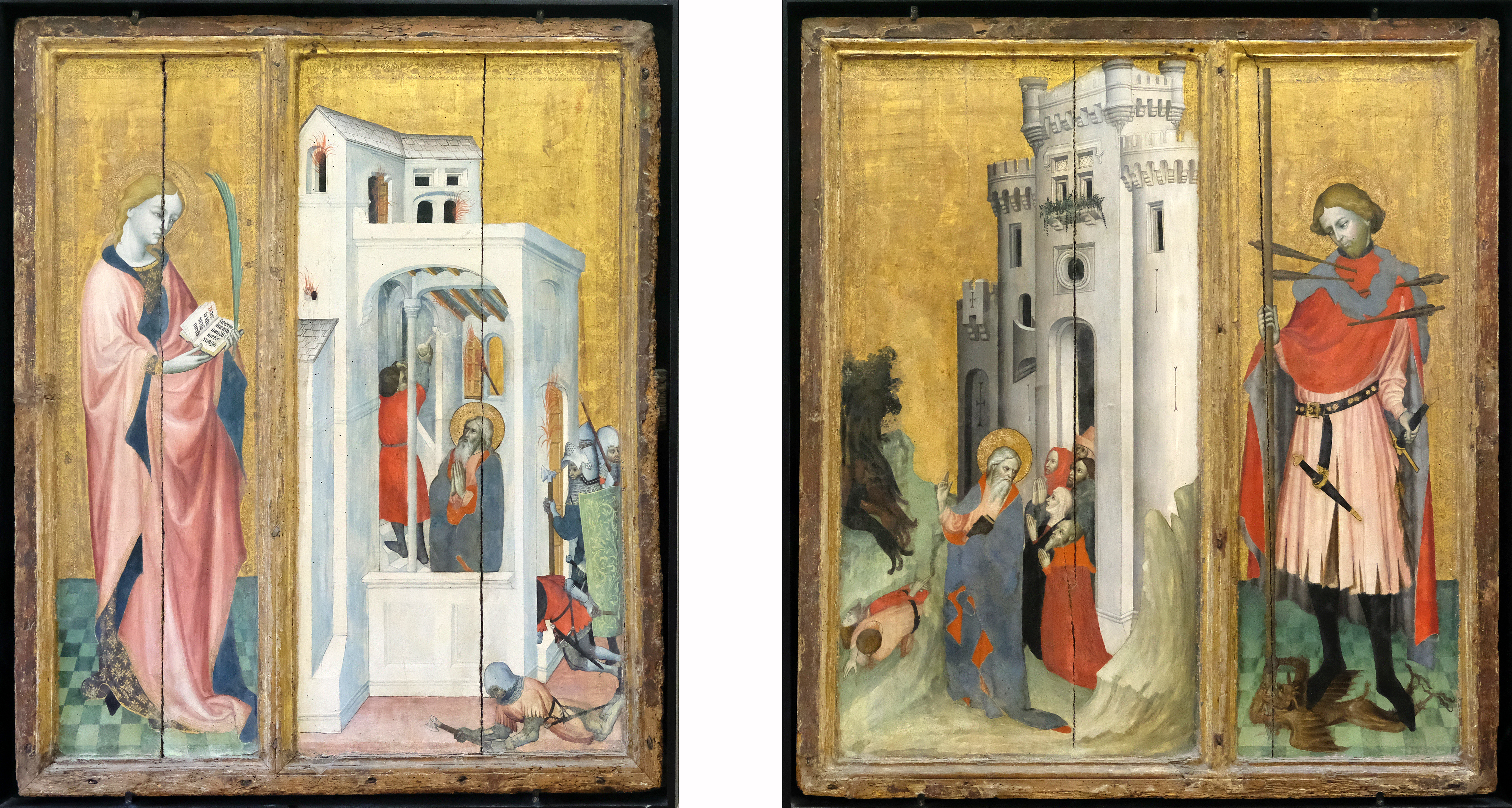 Le retable de Thouzon comprend deux panneaux (la partie centrale du triptyque a disparu), composés selon une structure identique mais symétrique : une scène de la vie de saint André en regard d'une grande figure de saint. Le tableau de gauche (RF 2677) évoque l'épisode où saint André fait éteindre un incendie par son disciple ainsi qu'une figure d'une sainte (peut-être sainte Claire ou sainte Catherine) ; le panneau de droite (RF 2678), celui où saint André chasse les démons de la ville de Nicée et saint Sébastien.